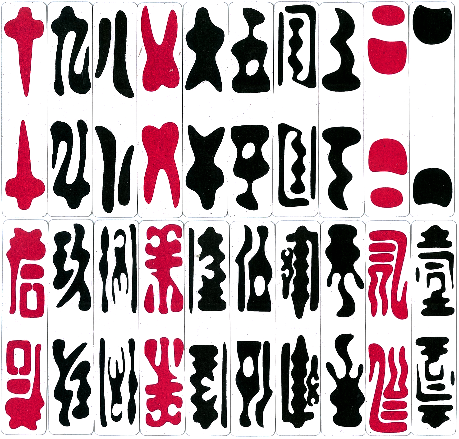 綏陽大貳牌